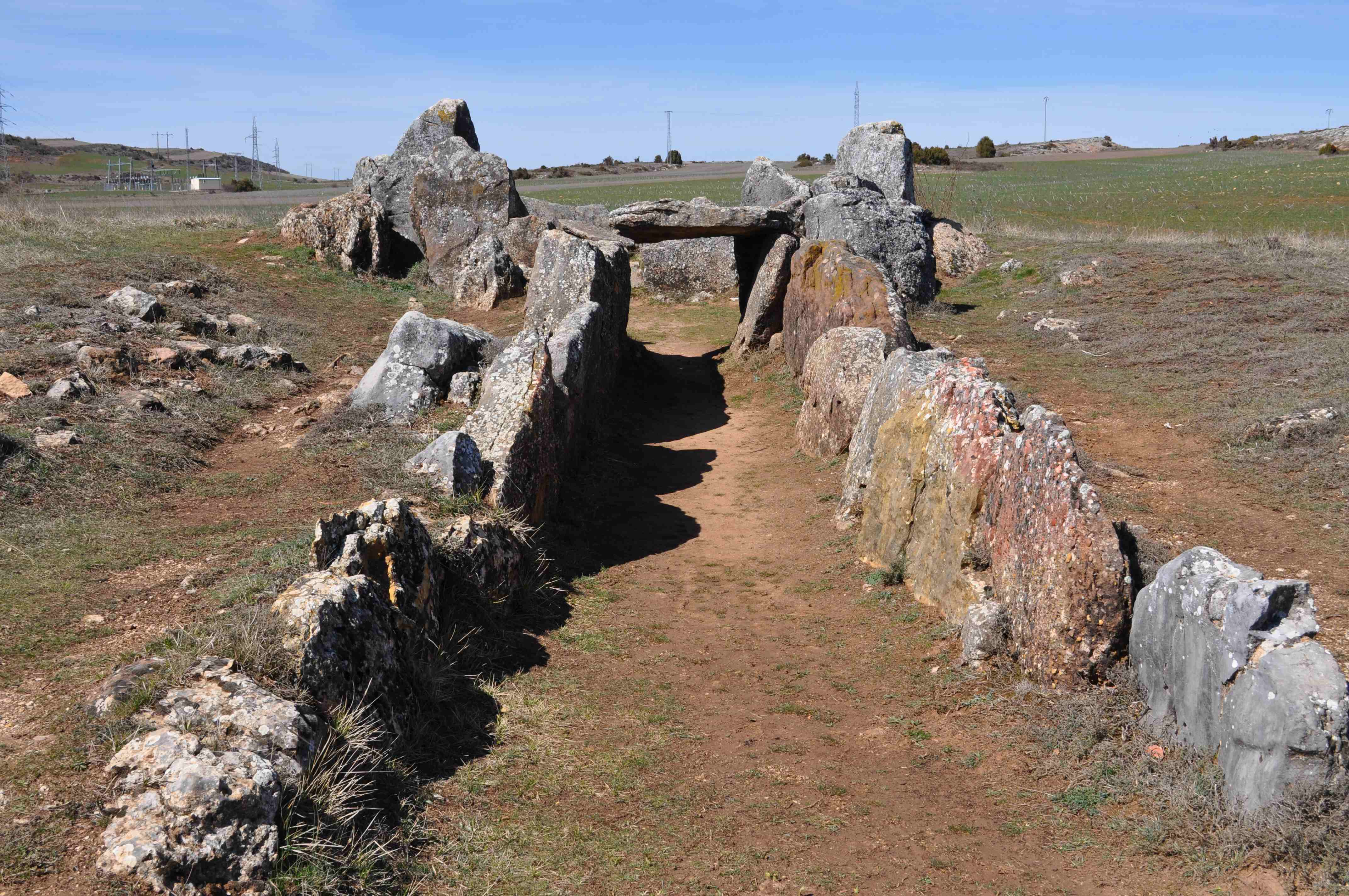 Dolmen de Cubillejo de Lara en 2011.